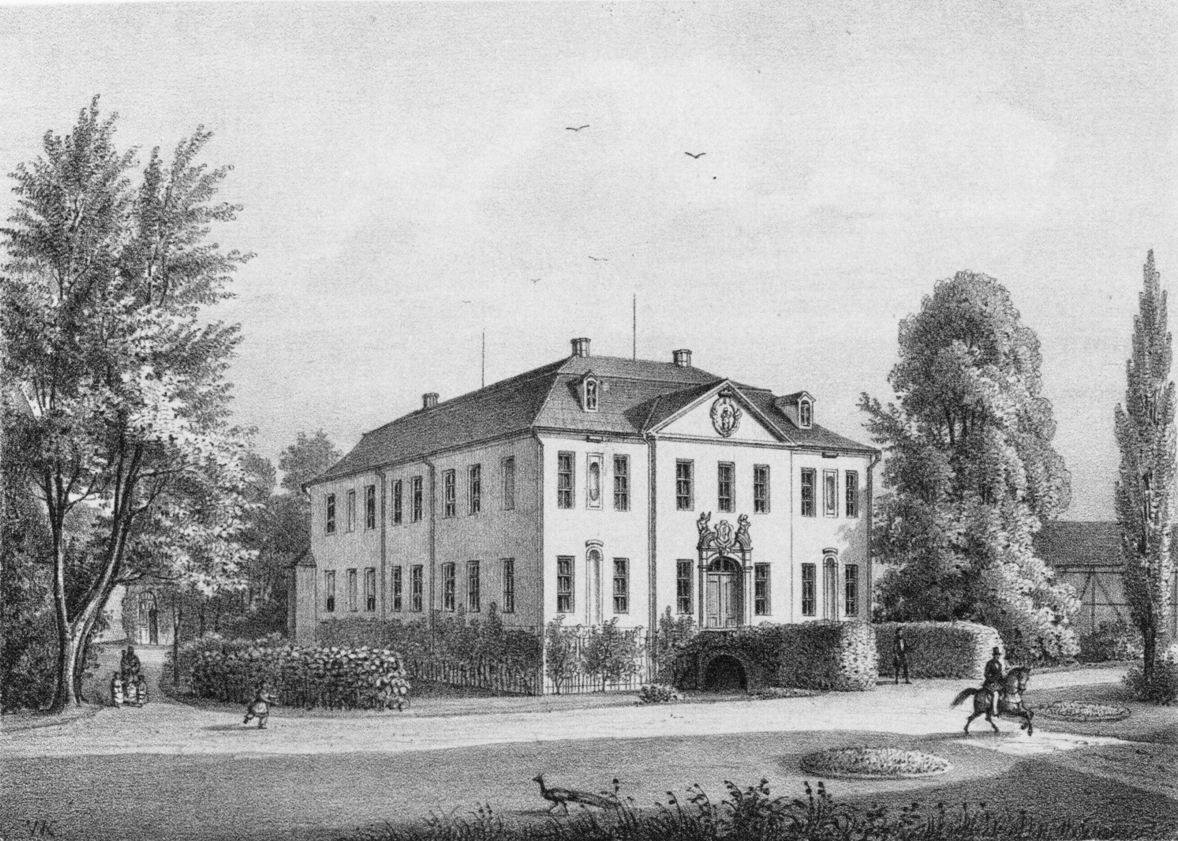 Das Rittergut Radibor Mitte des 19. Jahrhunderts Hornjoserbsce: Radworski hród w lěće 1859